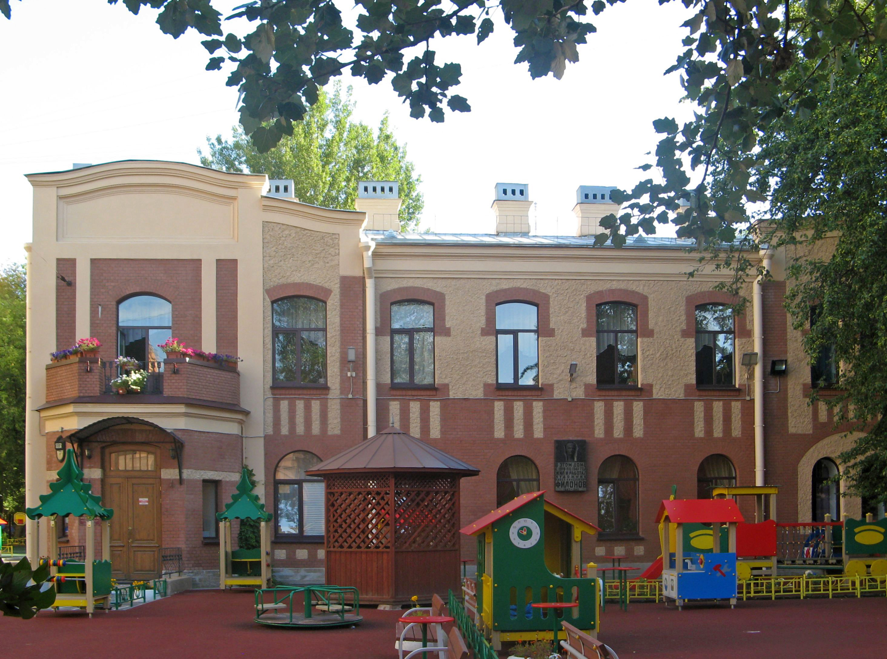 Дом писателей имени В.Ф. Голубева (общежитие для нуждающихся литераторов), в котором жили революционер Г.А. Лопатин, писатель А.П. Чапыгин, художник П.В. Филонов и др.: улица Литераторов, 19/10 (19А), Петроградский район, Санкт-Петербург